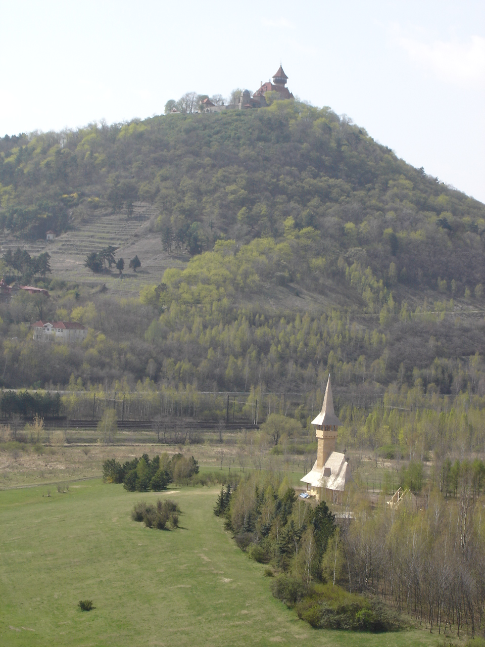 Pohled z věže kostela Nanebevzetí Panny Marie v Mostě na Hněvín a rumunský kostel